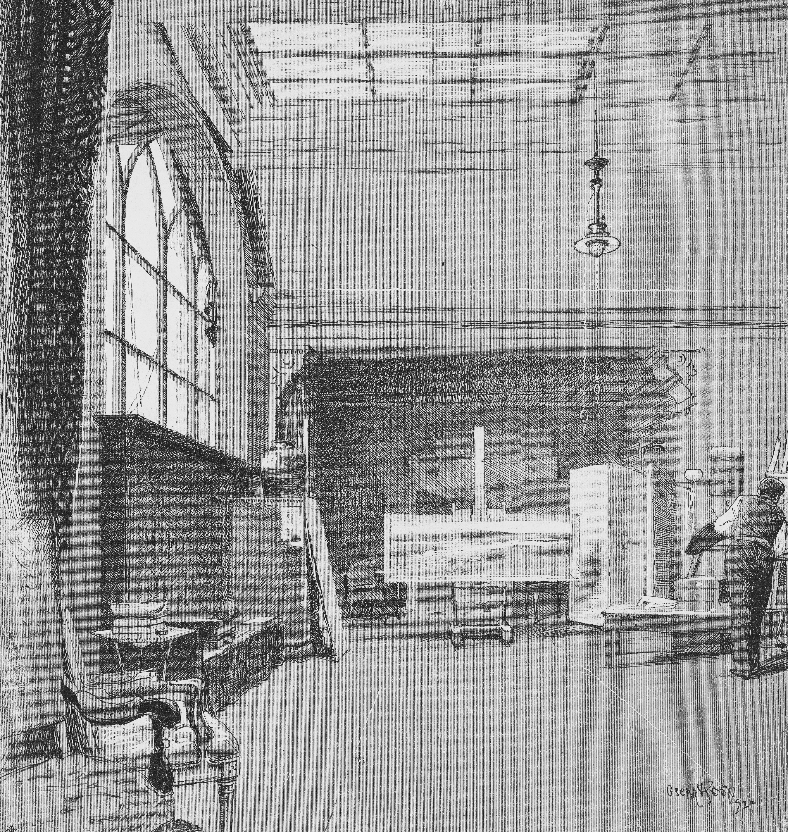 Prins Eugens ateljé, Valhallavägen 104-106 (senare Oscar Björcks ateljé)